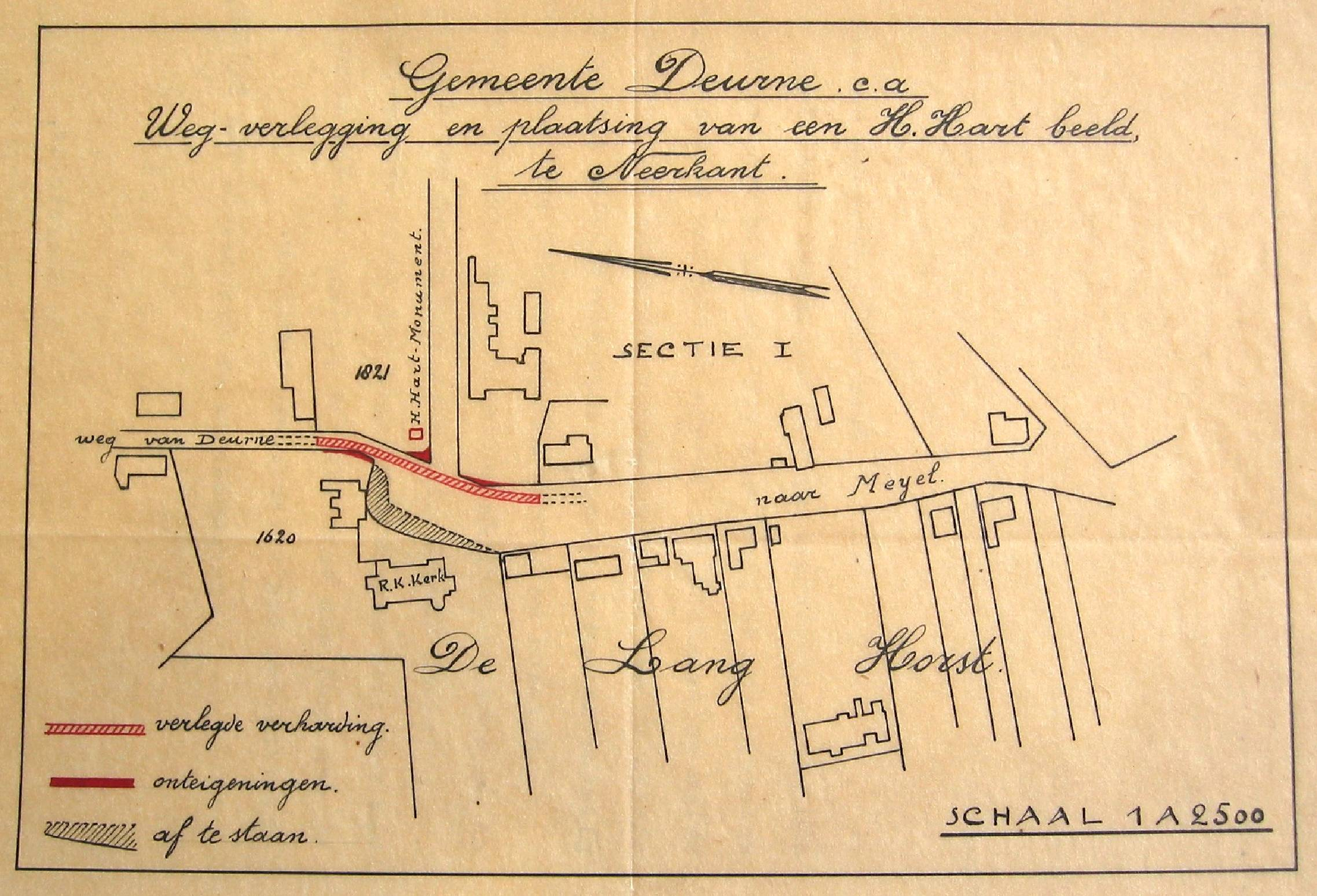 Deze kaart bevindt zich in RHC-E toeg. A-3180 Nieuw adm. arch. Deurne inv.nr. 89/27 en hoort bij een stuk uit 1923 waarin de pastoor van Neerkant een voorstel doet tot grondruil.